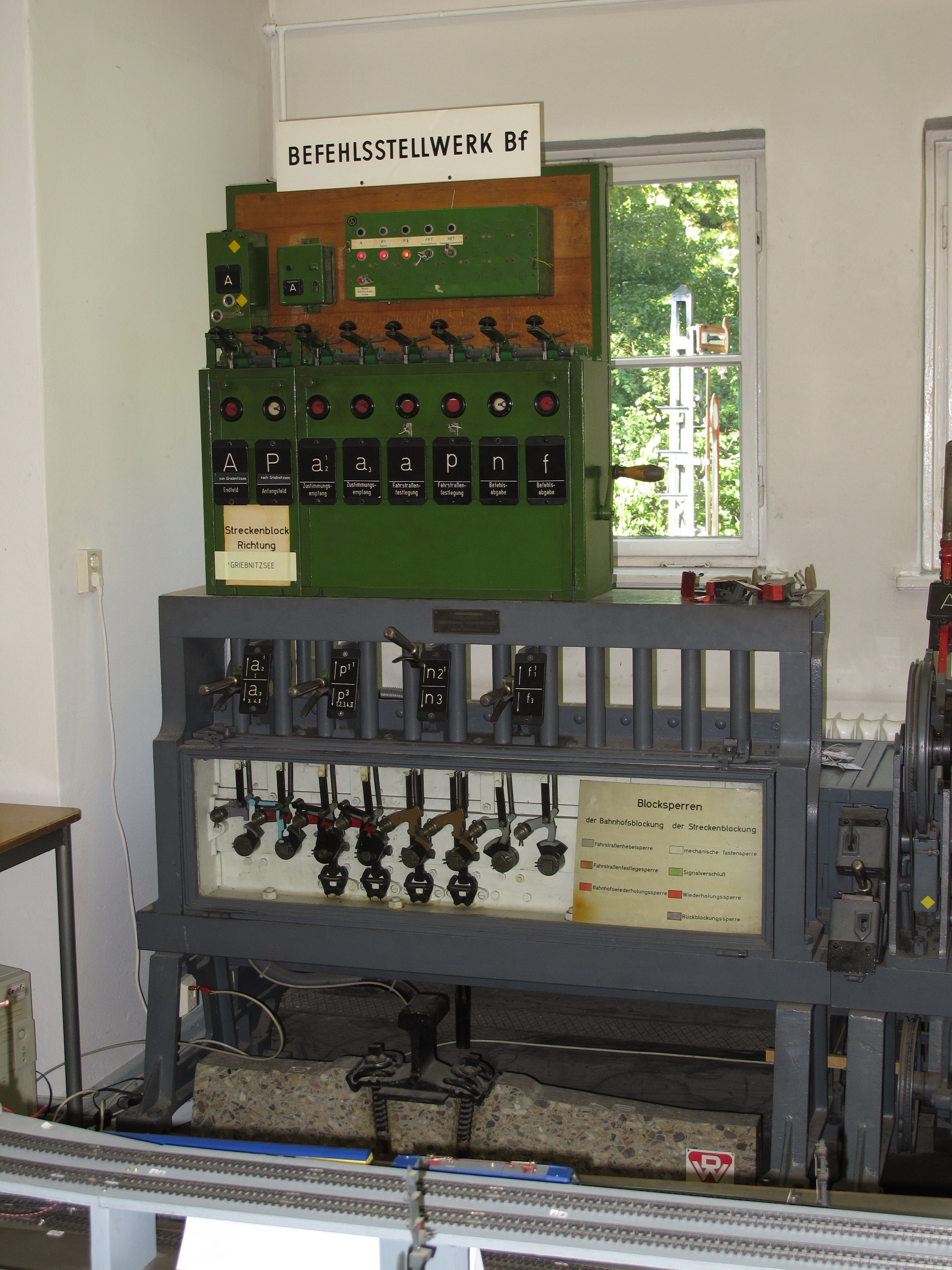 Felderblock mit Blockauf- und -untersatz eines mechanischen Stellwerks der Bauform Einheit im Eisenbahn-Betriebs- und Experimentierfeld der TU Berlin